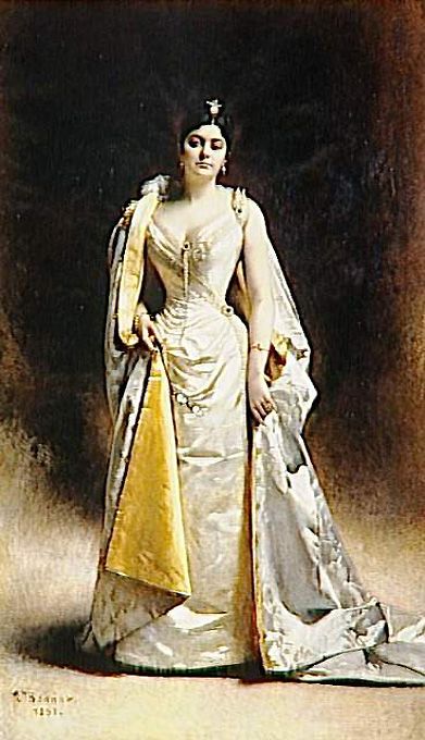 Portrait de madame Albert Cahen d’Anvers, née Warschawsky.